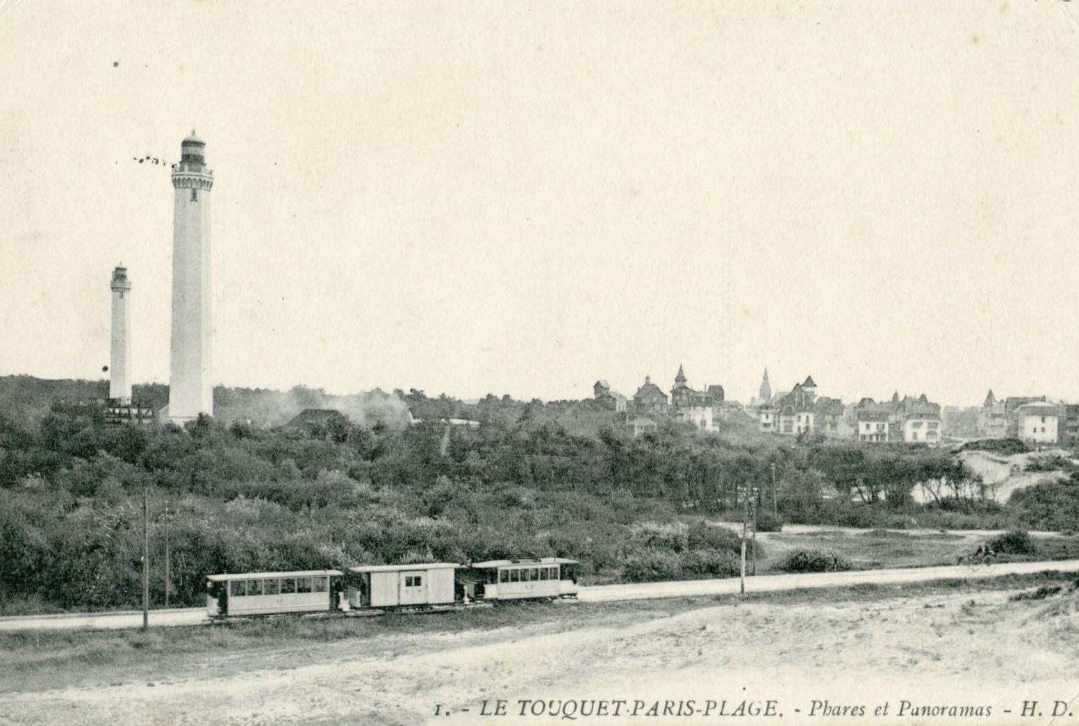 Le Touquet-Paris-Plage - CP - Le tramway devant les deux phares